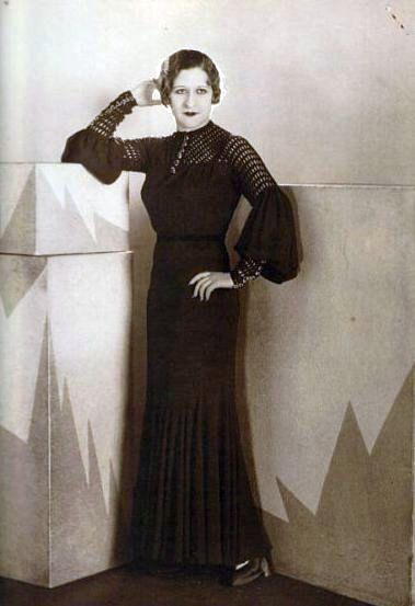 L'attrice italo-cilena Jole Fano negli anni trenta